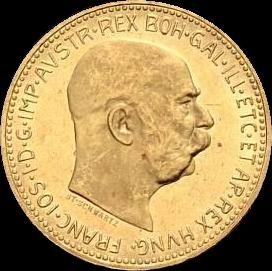 20 coronae, 1910 (Austria) - obverse